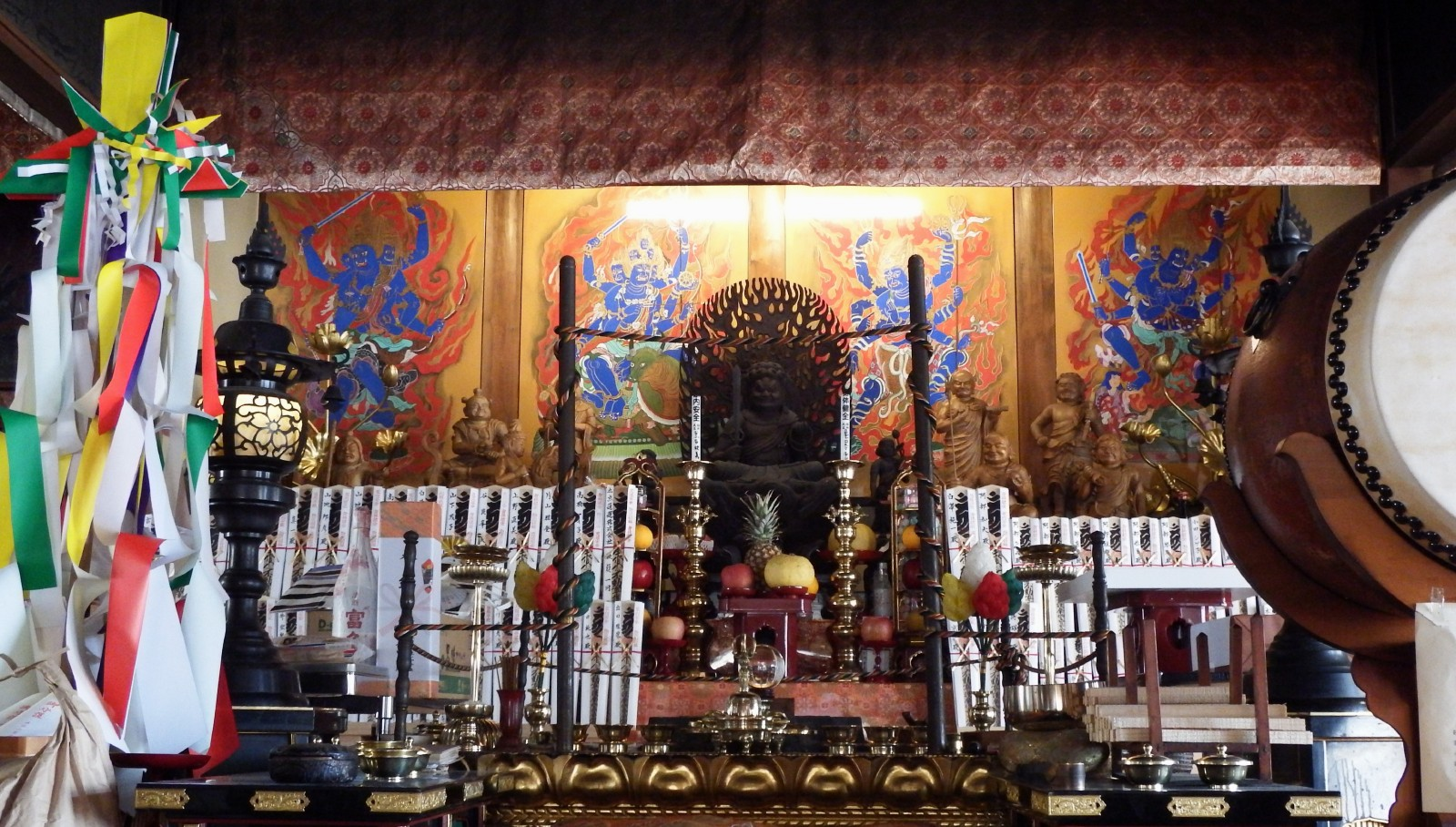 聖代寺の内陣